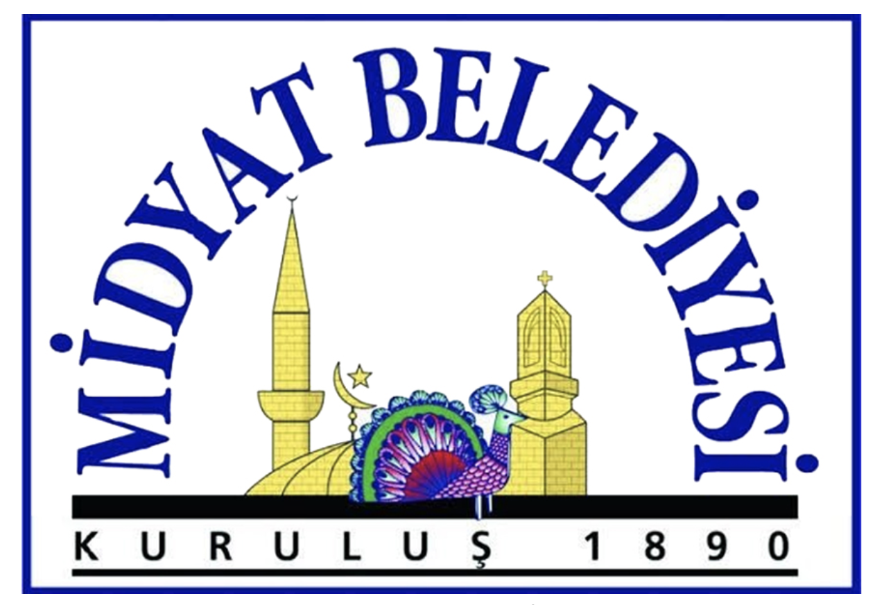 altes Wappen der türkischen Stadt Midyat bis zum 4. März 2019.